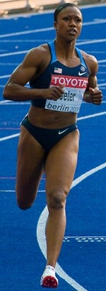 Carmelita Jeter, Berlin 2009